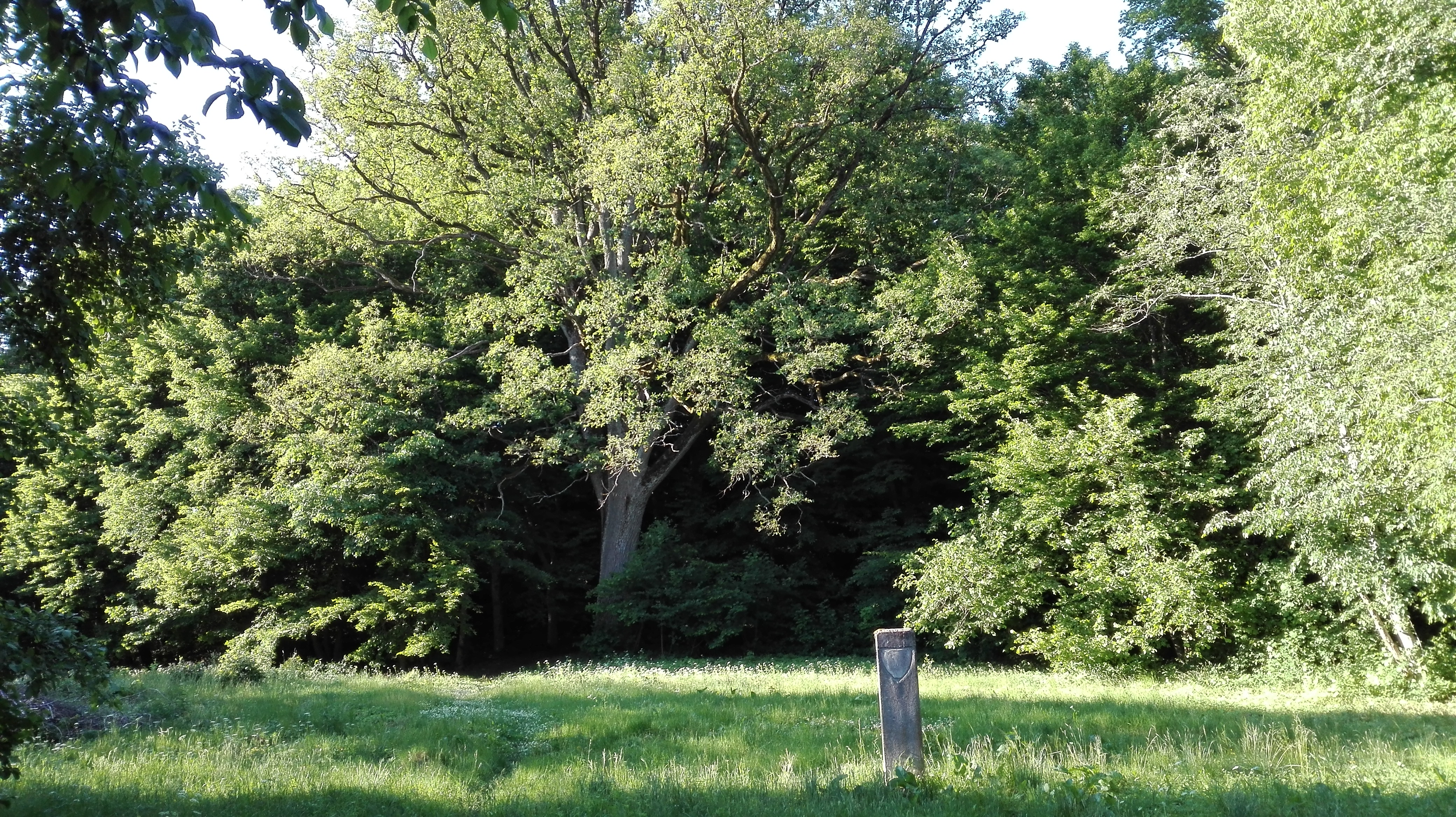 Veiviržėnų piliakalnis iš toliau